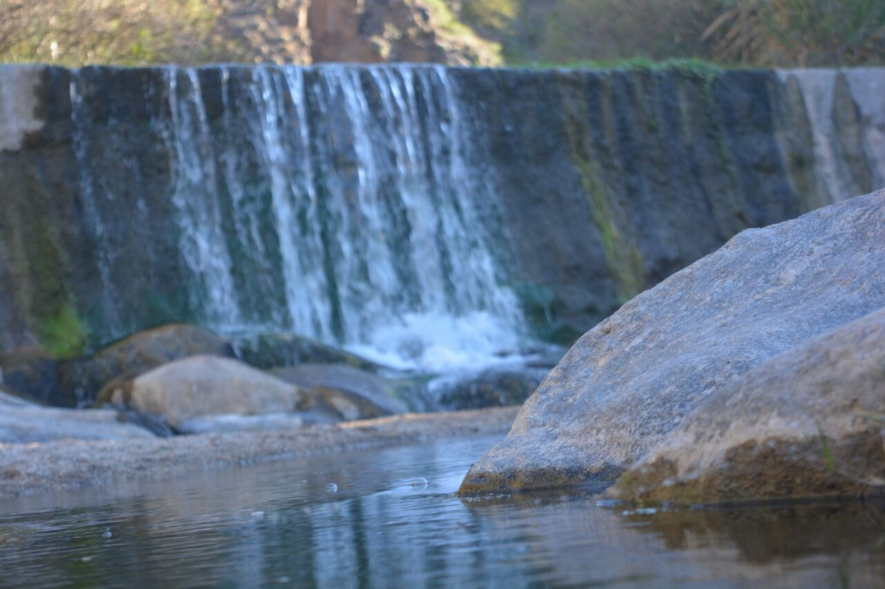 paisaje